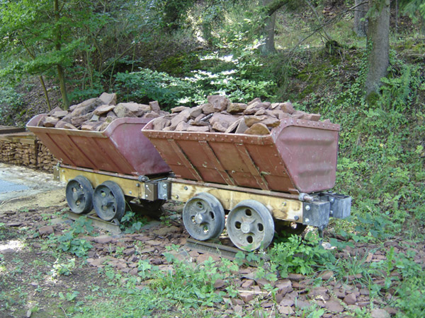 Buggien. Allgemenges zum Bild: Dëst Bild weist déi sougenannte Buggien, déi fréier an de Minièren zum Asaz komm sinn (Bielesser Gaalgebierg).